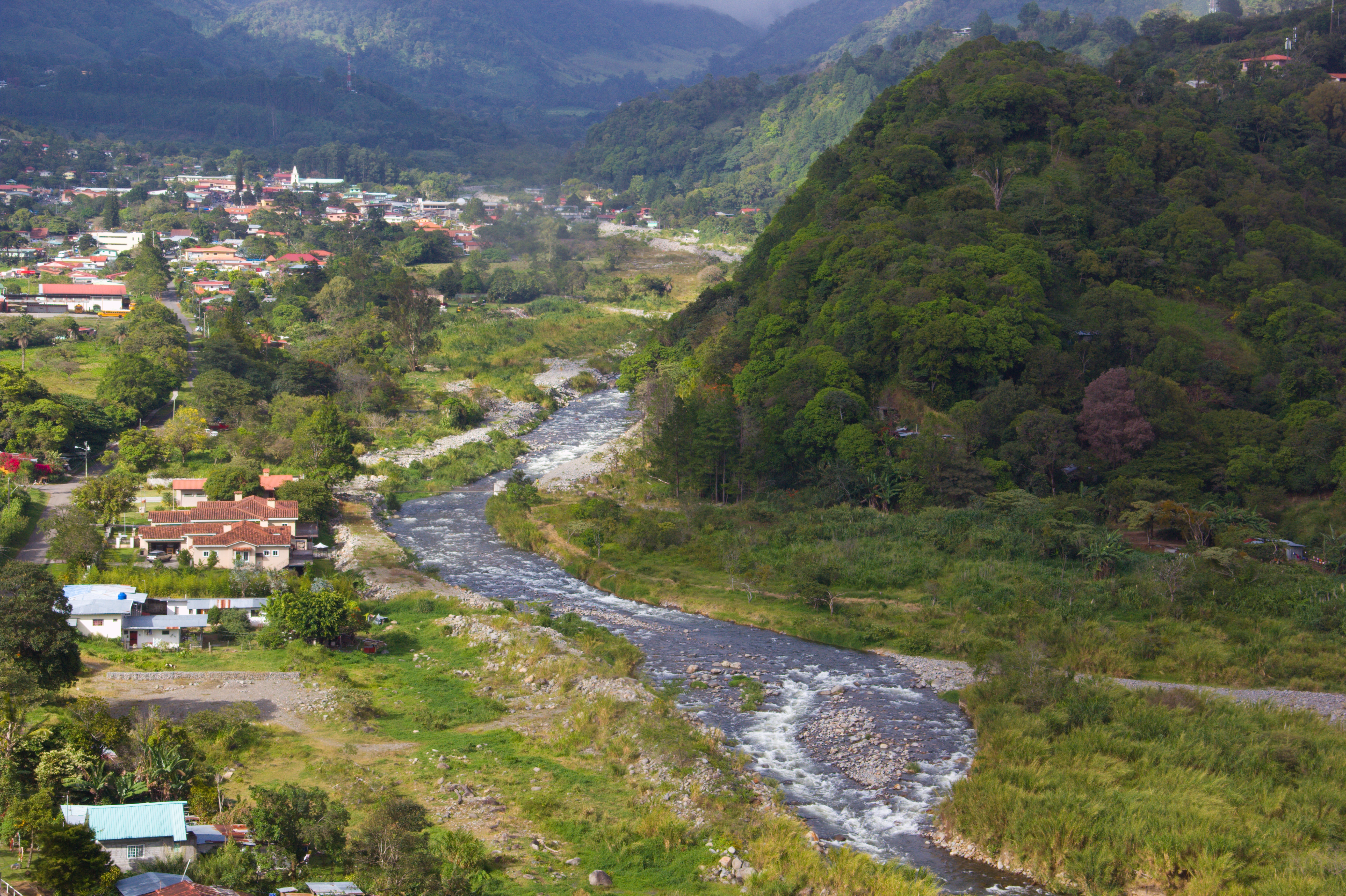 Vista del Río Caldera, bordeado por el poblado de Boquete. Provincia de Chiriquí, Panamá.